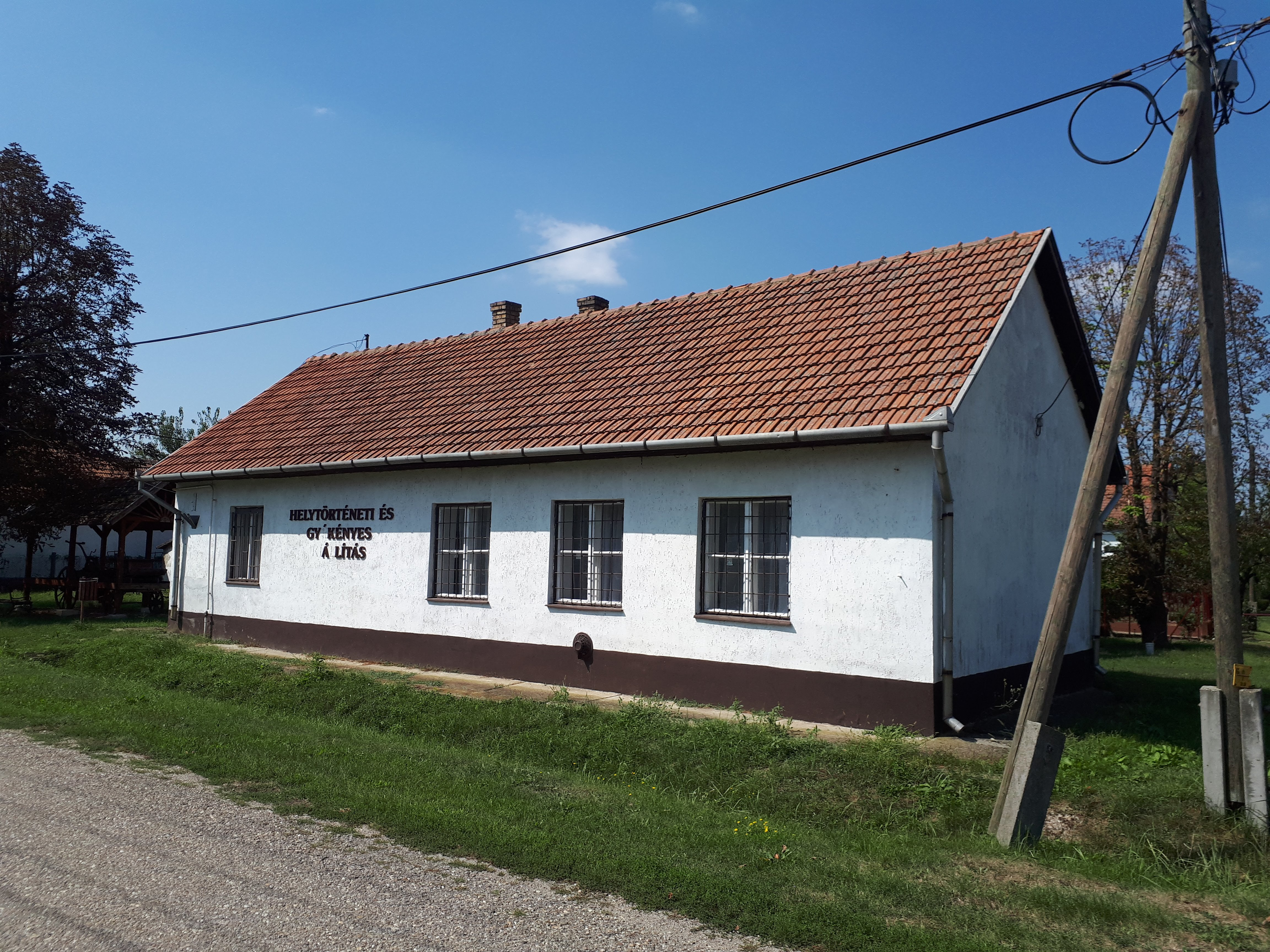 A Helytörténeti és Gyékényes Kiállítás épülete Tiszavalkon